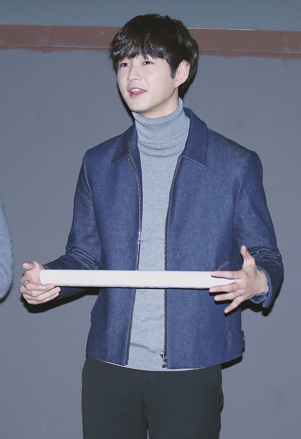 170107 여교사 무대인사 김하늘 유인영 이원근